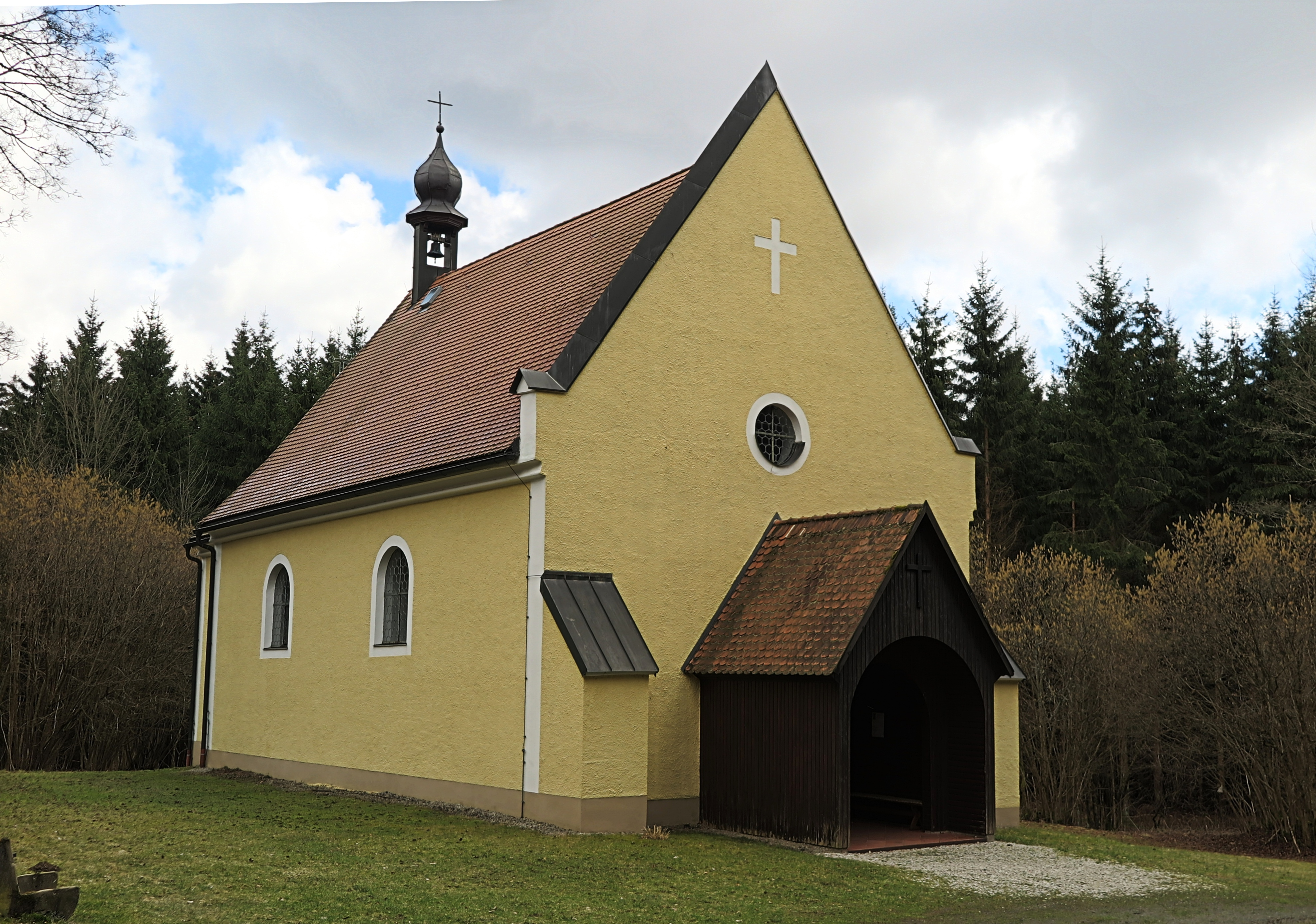 Deutschland, Bayern, Oberpfalz, Landkreis Tirschenreuth, Nikolauskirche in Högelstein zwischen Neualbenreuth und Mähring